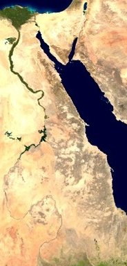 Nile & Red Sea from sattellite